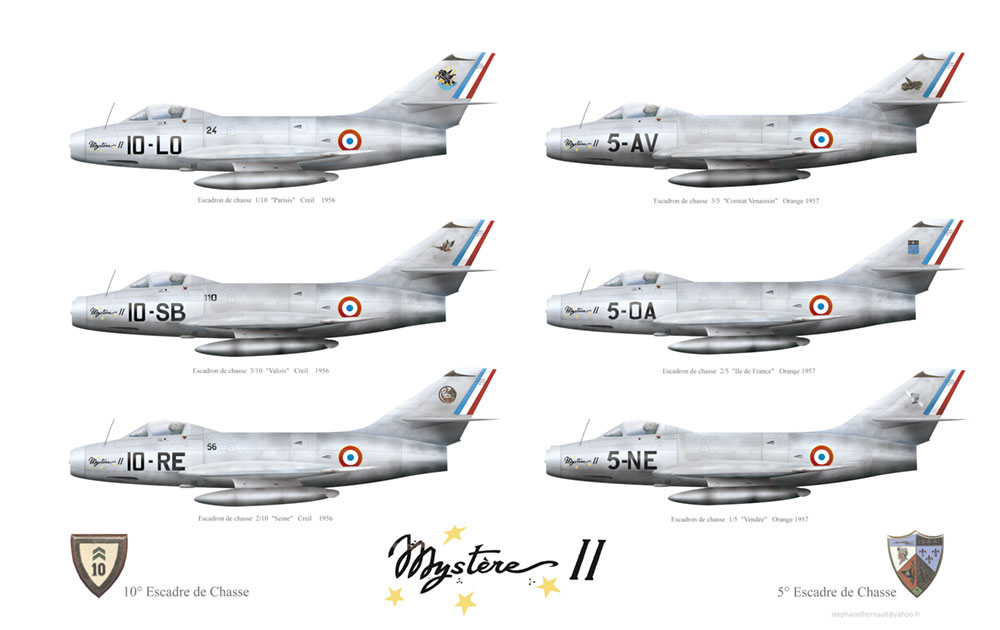 Mystère II Armée de l'Air 1956 - 1957 5° et 10° escadre de chasse